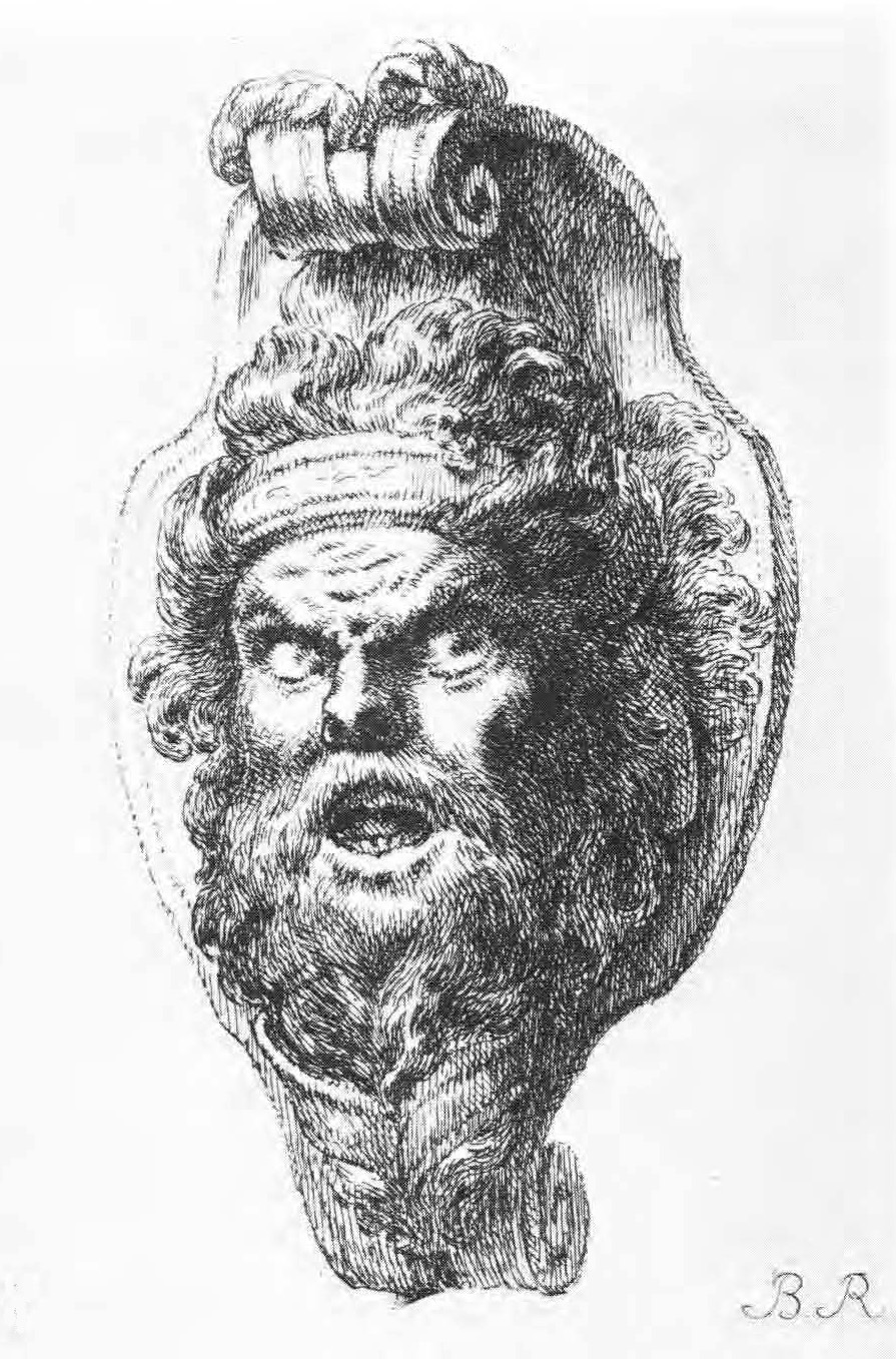 Maske am Zeughaus zu Berlin. Aus dem Werk Larven nach den Modellen des berühmten Schlüters gezeichnet und in Kupfer geätzt von B. Rode, erschienen in "Berlin, im Verlag bei Heinrich Rode" o.J. (um 1759).